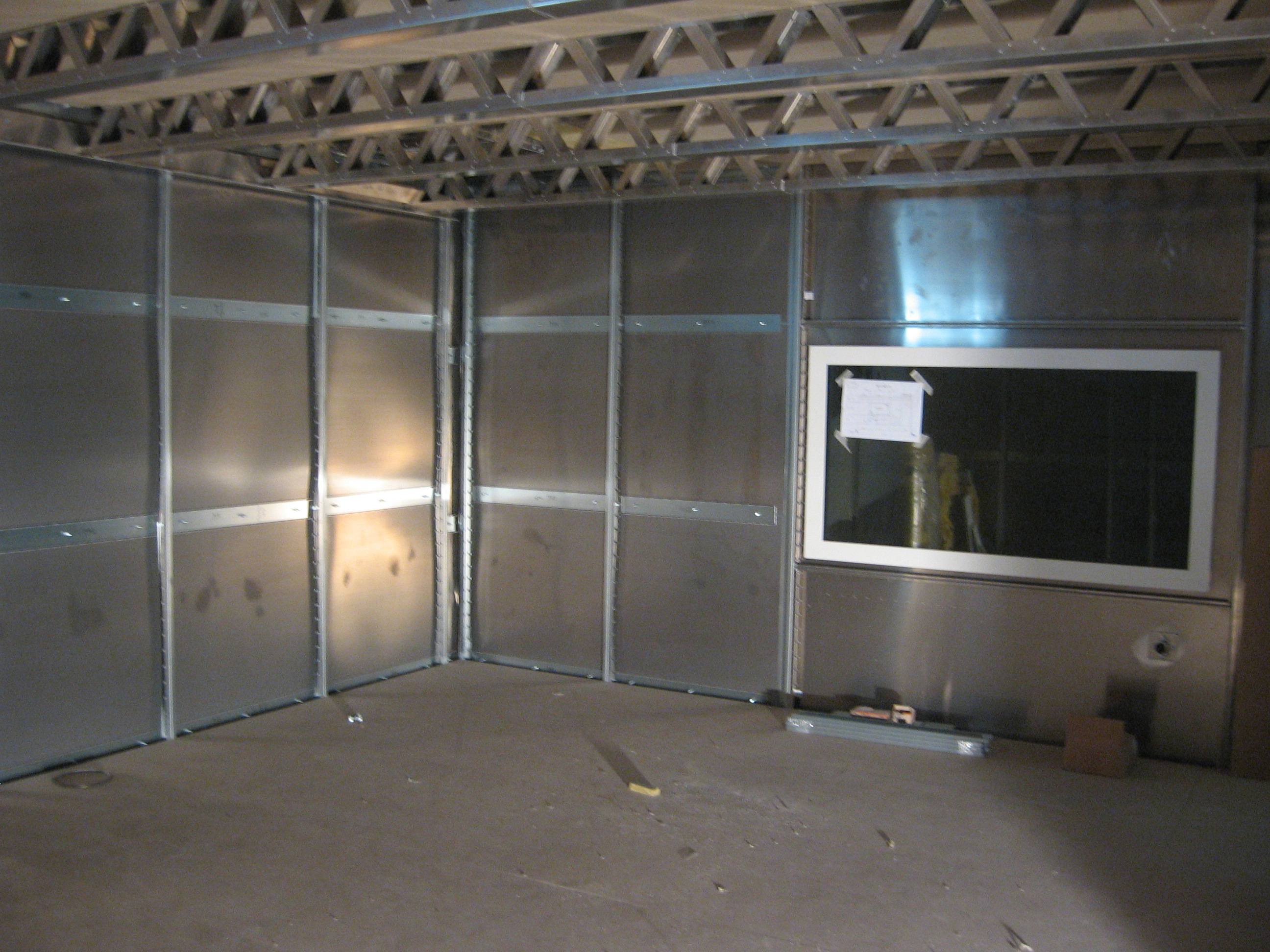 MRI-scanruimte in aanbouw met Kooi van Faraday